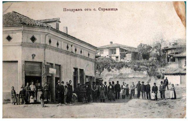 с. Стражица